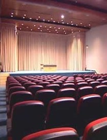 Uno de los centros, del la Obra Social Caja España-Duero